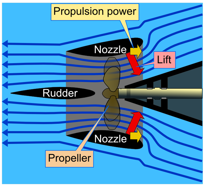 Nozzle and rudder